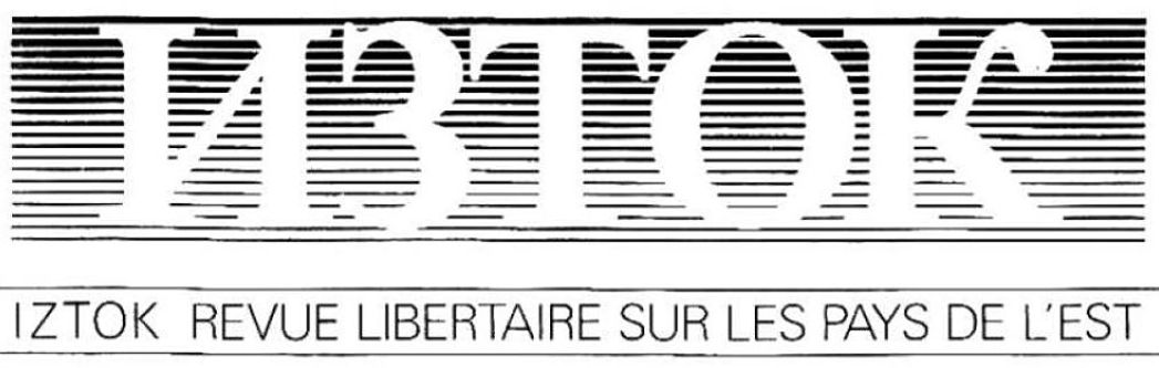 Iztok « revue libertaire sur les pays de l’Est » (Изток : периодично списание) est le titre d'une publication éditée de septembre 1980 à 1991 par un collectif d’exilés des pays de l’Est (Bulgarie, Pologne, Roumanie).